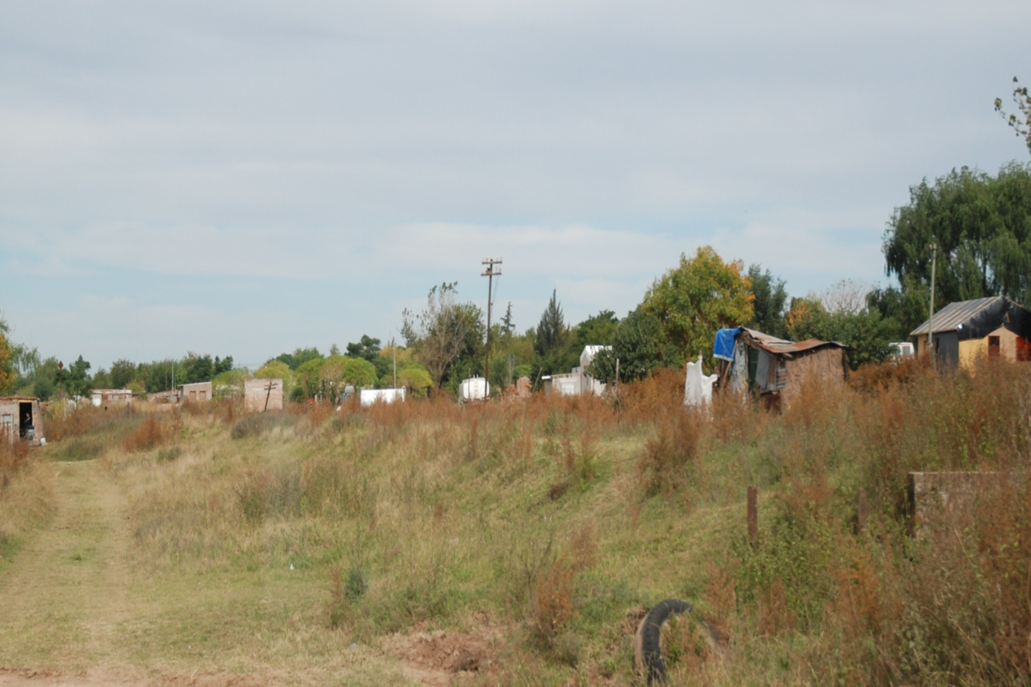 Viviendas precarias ("villa de emergencia") en la periferia de la ciudad de Pergamino, provincia de Buenos Aires, Argentina